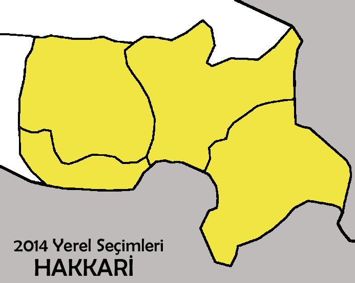 2014 seçim sonuçlarının ilçeler bazındaki bilgisini gösteren dosya.